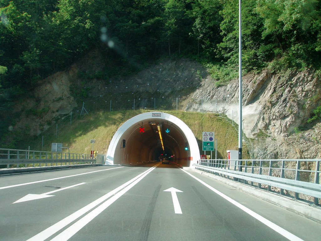 tunel